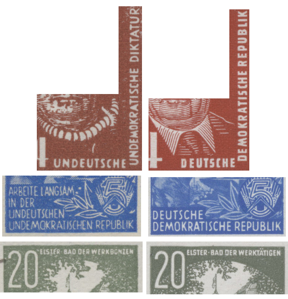 Propagandafälschungen des KgU (Kampfgruppe gegen Unmenschlichkeit). Links die Fälschung. Rechts das Original.